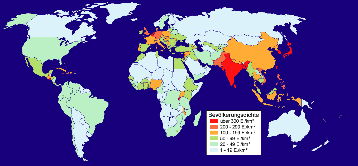 Weltkarte mit Bevölkerungsdichten. Jeder Staat (soweit in der Karte erkennbar) ist entsprechend der auf Liste unabhängiger Staaten nach Bevölkerungsdichte angegebenen Bevölkerungsdichte und der beigefügten Legende eingefärbt. Einige kleinere Stellen, vor allem Inseln, sind noch grau und werden noch bei Gelegenheit nachgetragen. Quelle: erstellt von Benutzer:Neitram basierend auf der leeren Weltkarte Image:BlankMap-World.png Lizenz: GFDL